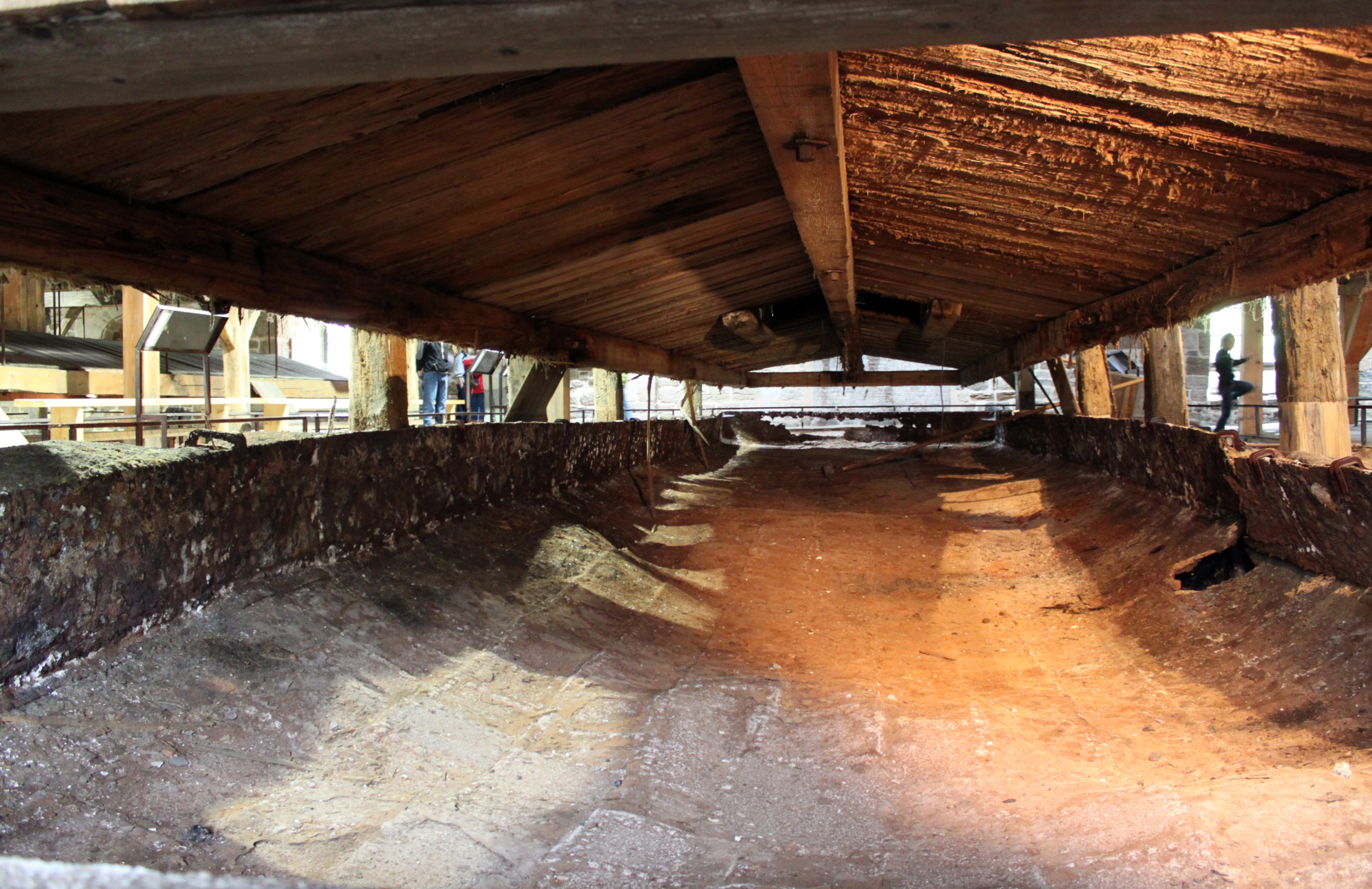 Saline de Salins-les-Bains, Jura, France